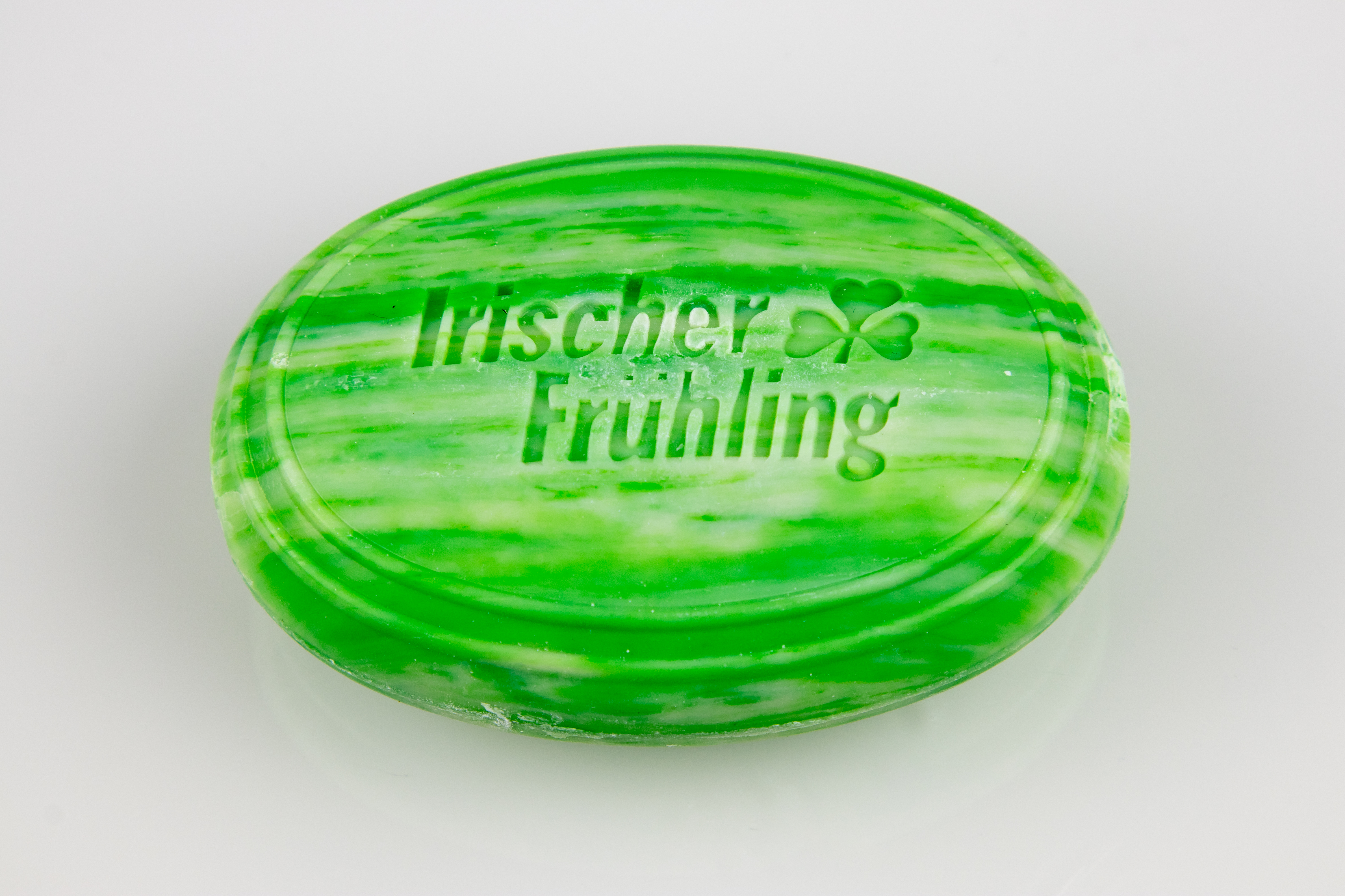 Seife "Irischer Frühling". 1980er Jahre